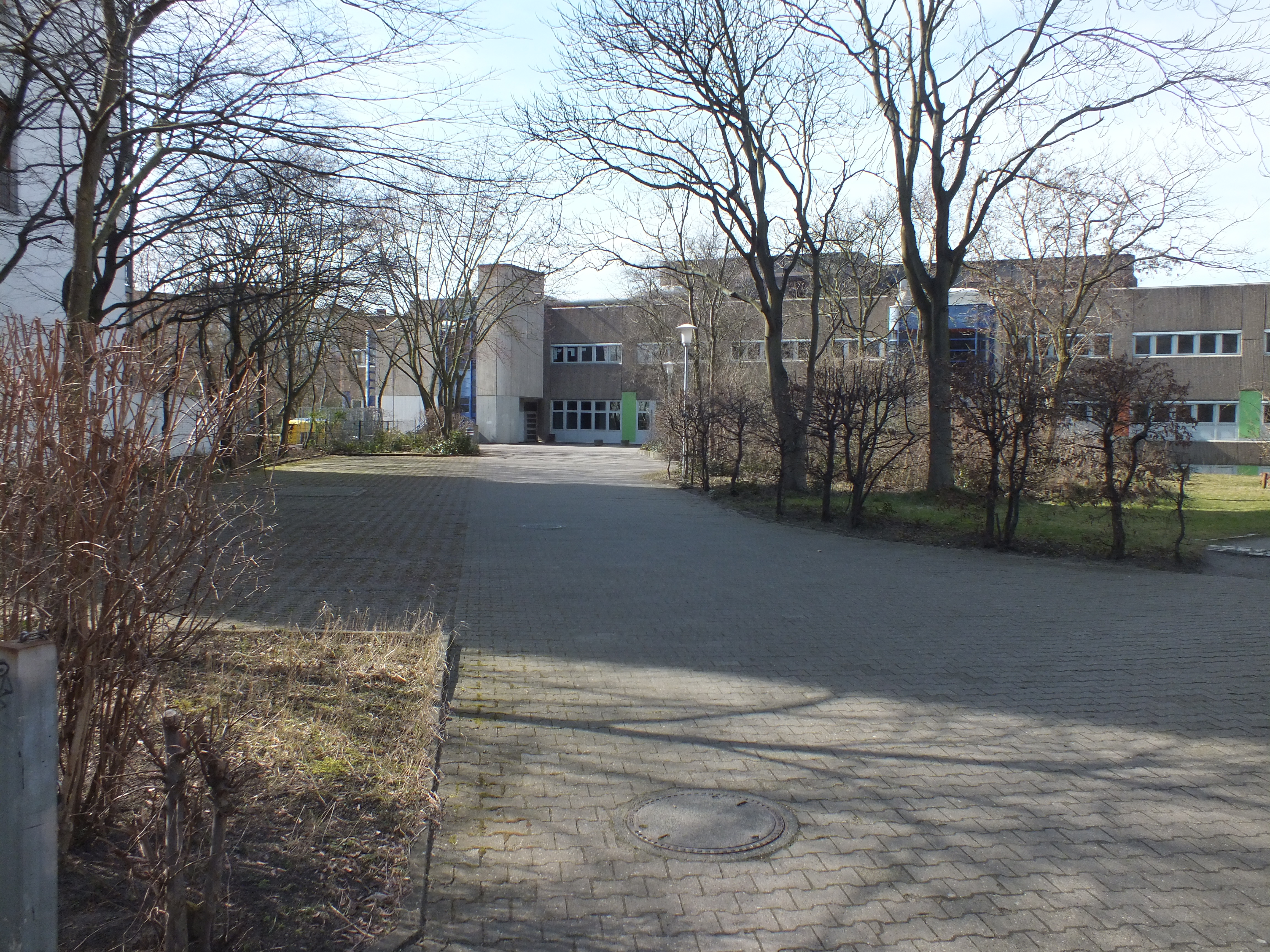 Fontanepromenade in Kreuzberg: Nebeneingang zur CvO-Schule, Parzelle 14a